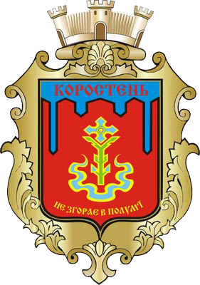 Герб Коростеня